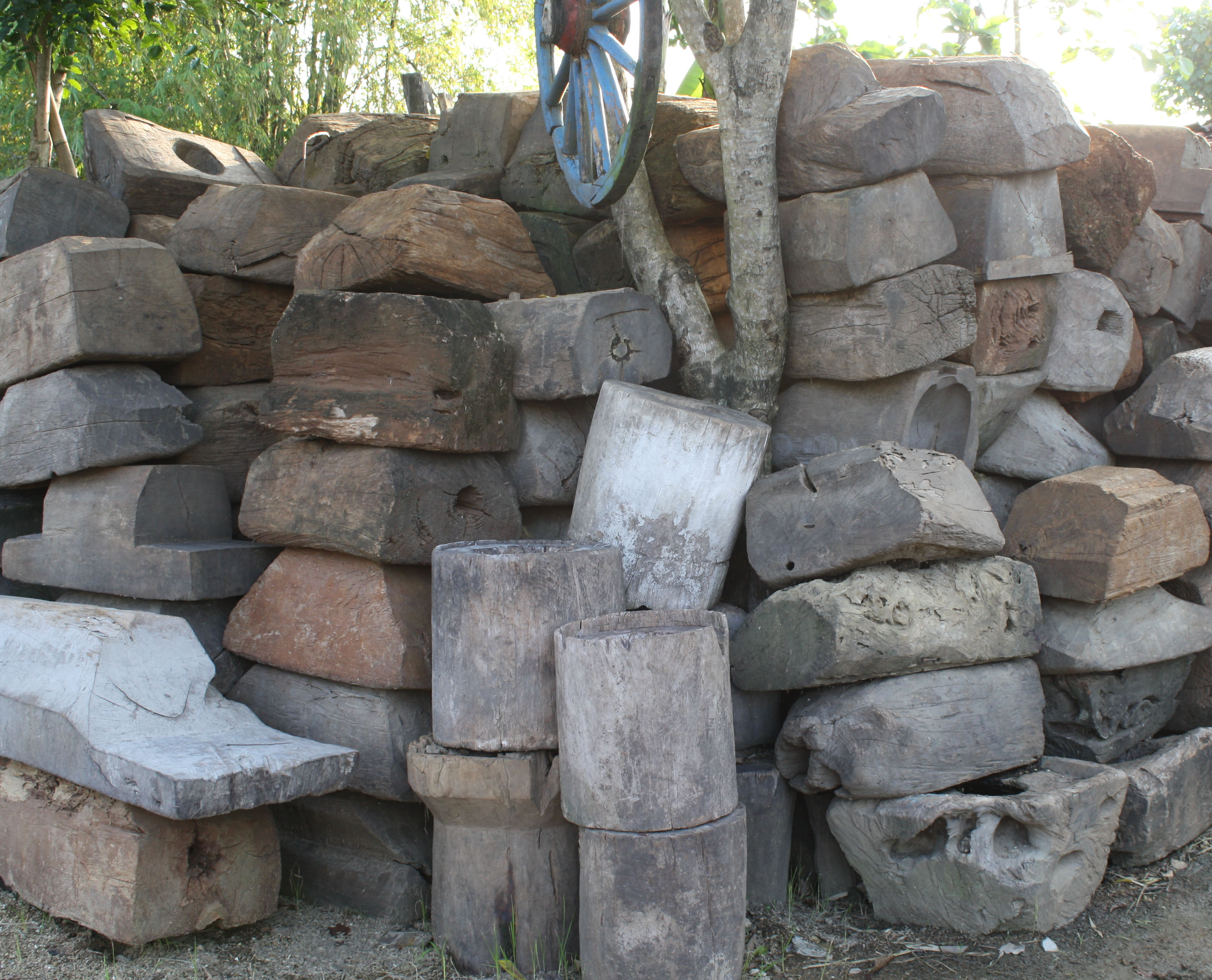 Lumpang yang terbuat dari kayu